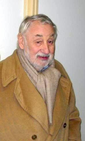 Philippe Noiret à Eu (Seine-Maritime, France) lors de l'inauguration de la loge qui lui a été dédiée au sein du théâtre du château d'Eu.